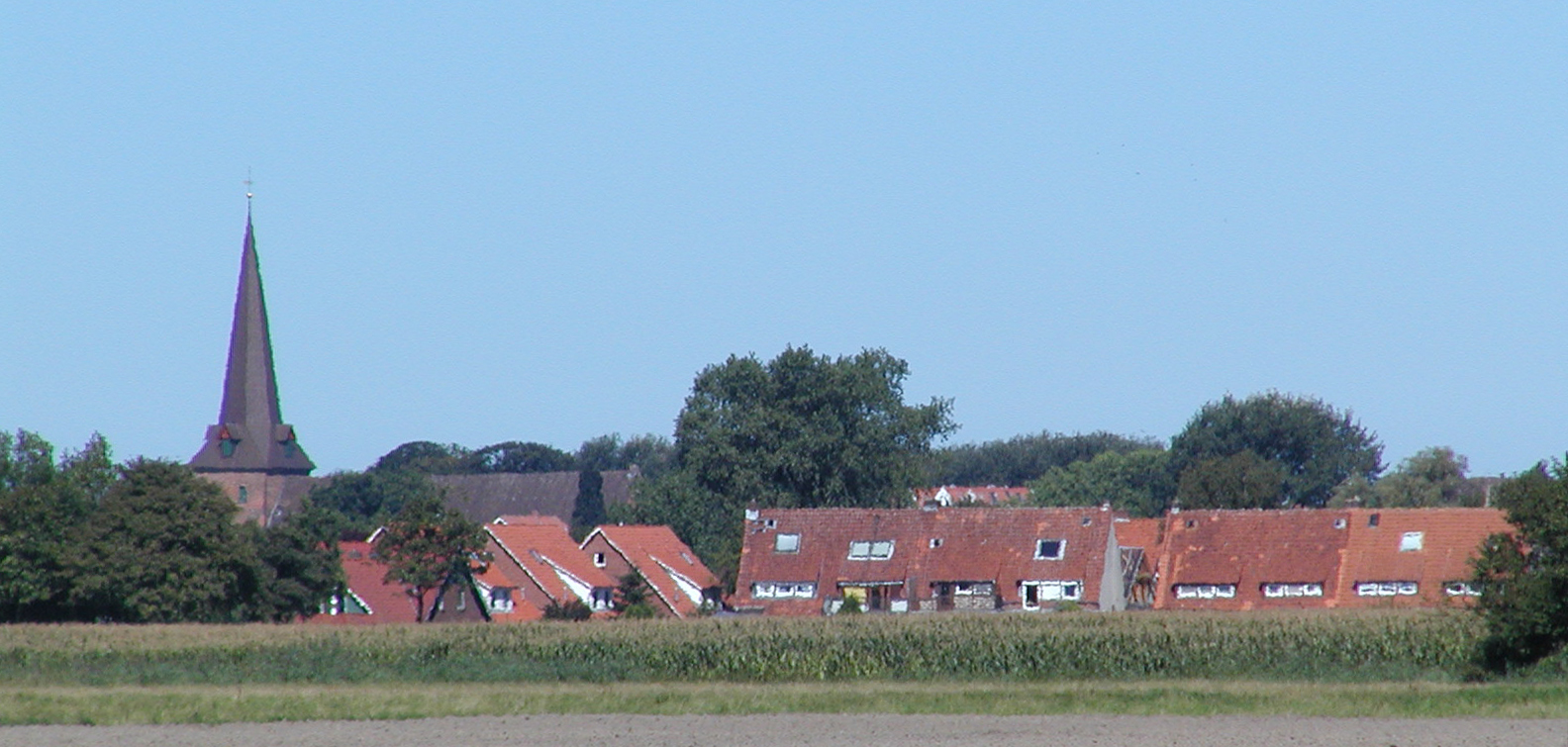 Otterndorf aus Südost (Osterbruch) gesehen